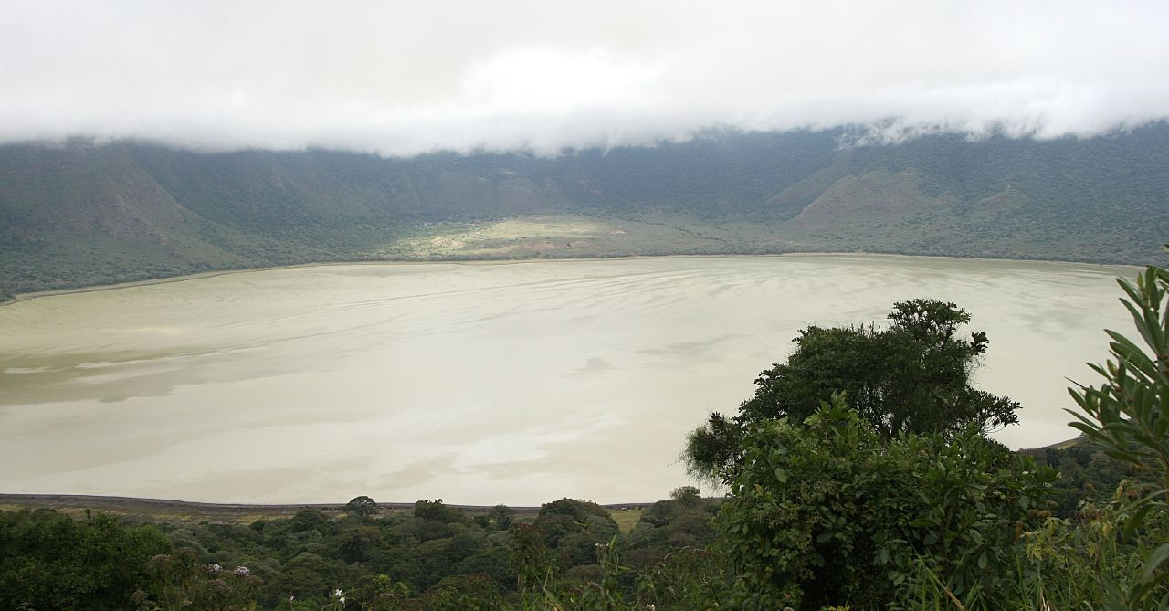 Tanzanie, Descente dans le cratère de l'Empakaï